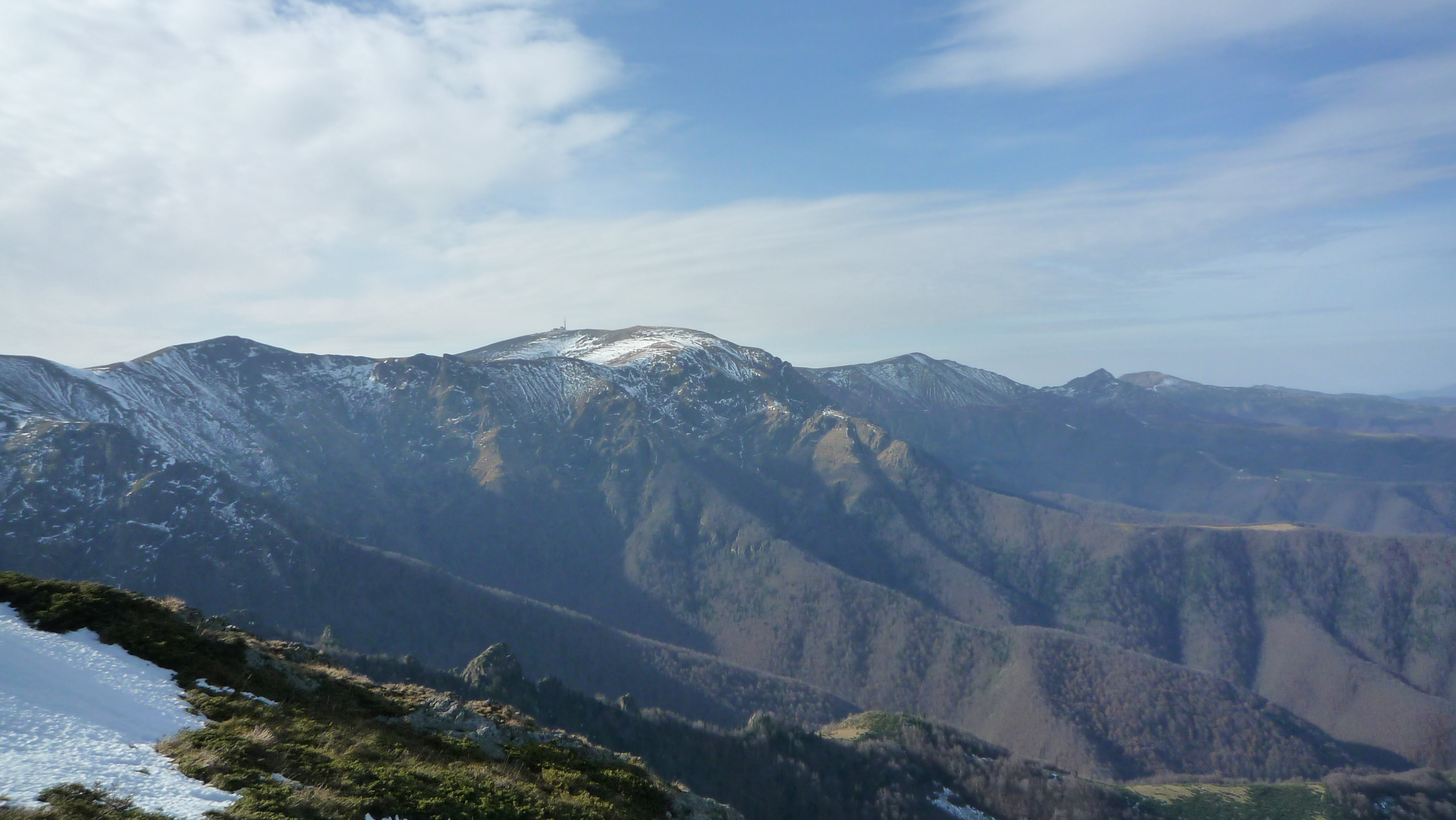 панорама към вр.Ботев от Марагидик/Русалка/